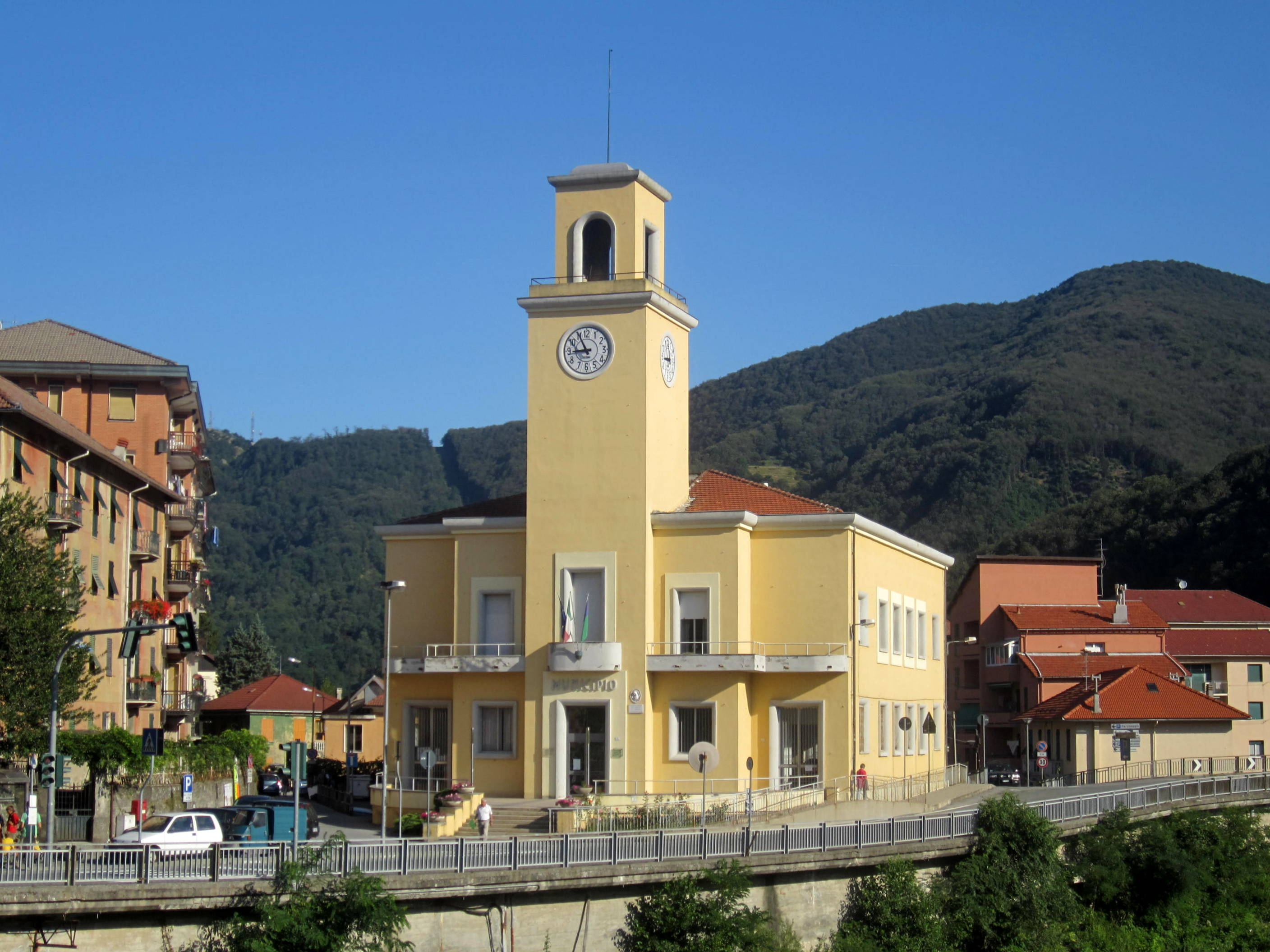 Municipio di Campo Ligure